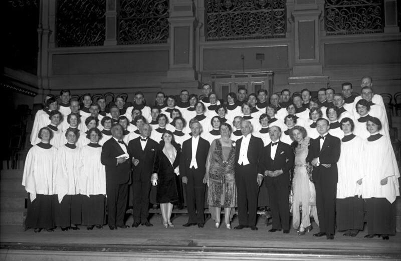 Der weltberühmte Dayton-Westminster-Chor aus Amerika gastiert zum erstenmal in der Philharmonie in Berlin! Der weltberühmte Dayton-Westminster-Chor nach seinem ersten Konzert in der Philharmonie in Berlin. Vorn Mitte die Präsidentin des Chors Mrs. H.E. Talbot, rechts daneben der amerikanische Botschafter in Berlin Dr. Gould Shourmann, links neben ihr der Dirigent des Chors Dr. John Finley Williamson.